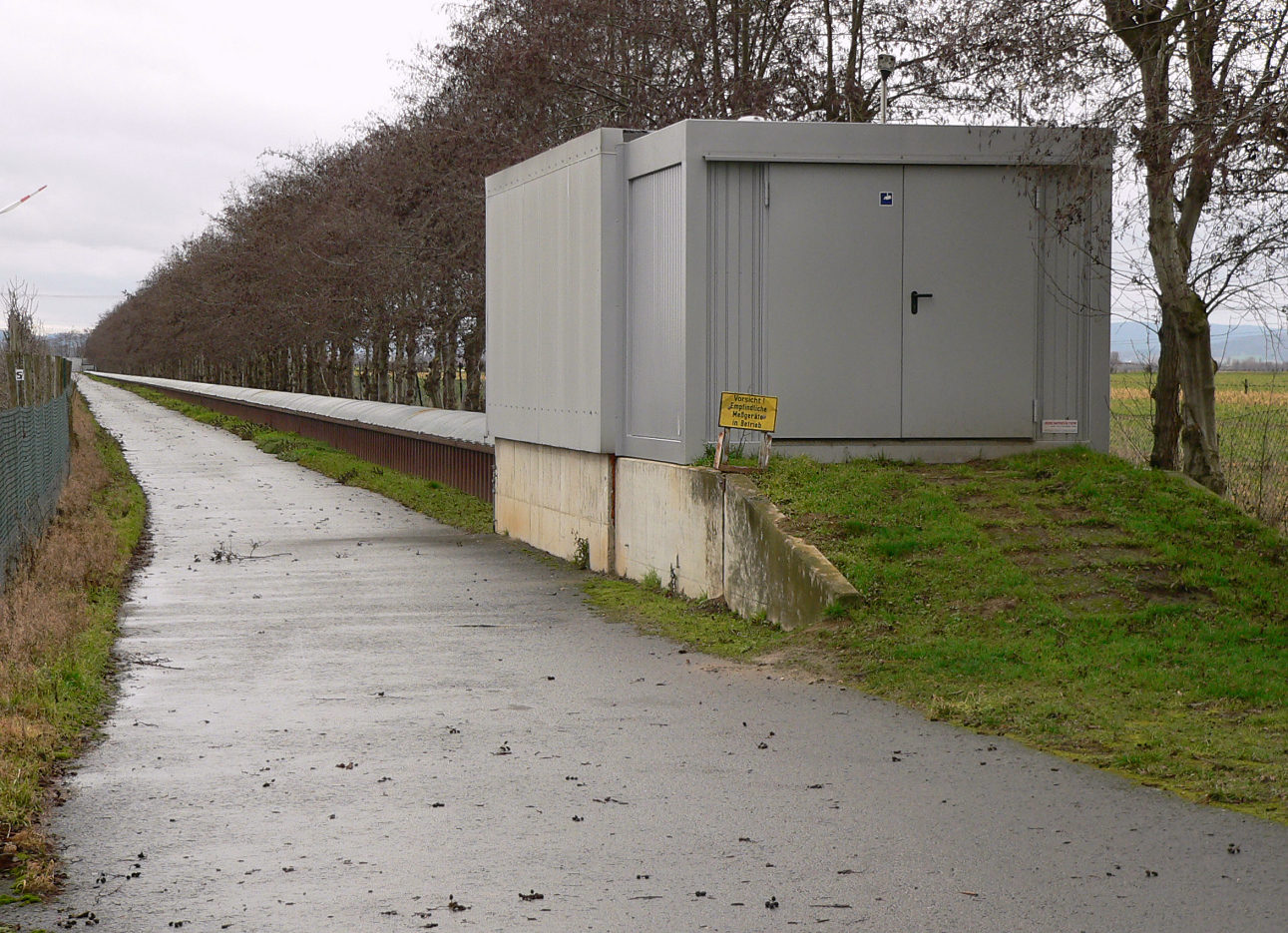 Geo 600 in Ruthe